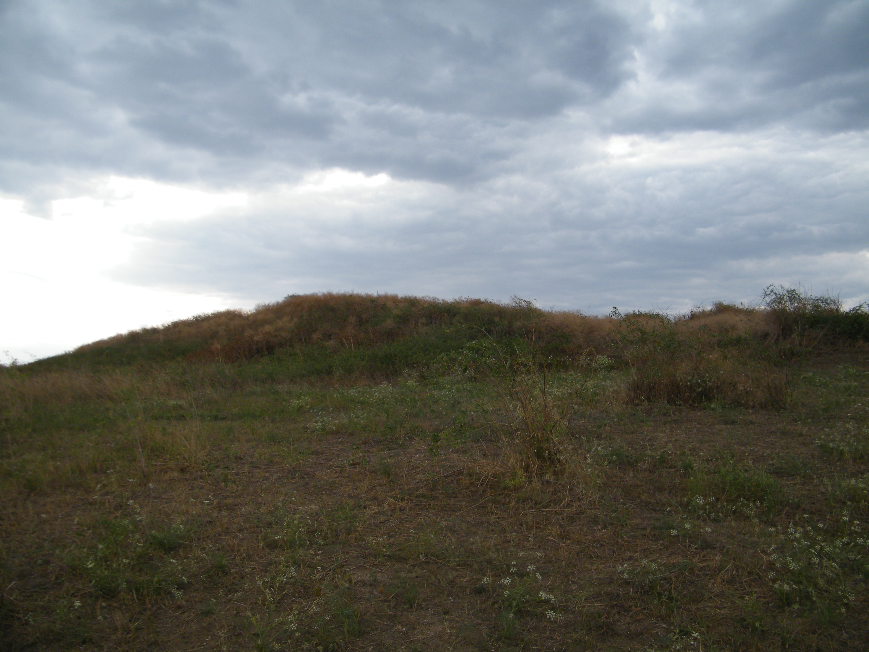 Каборга